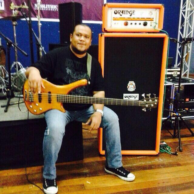 Eddie Wings